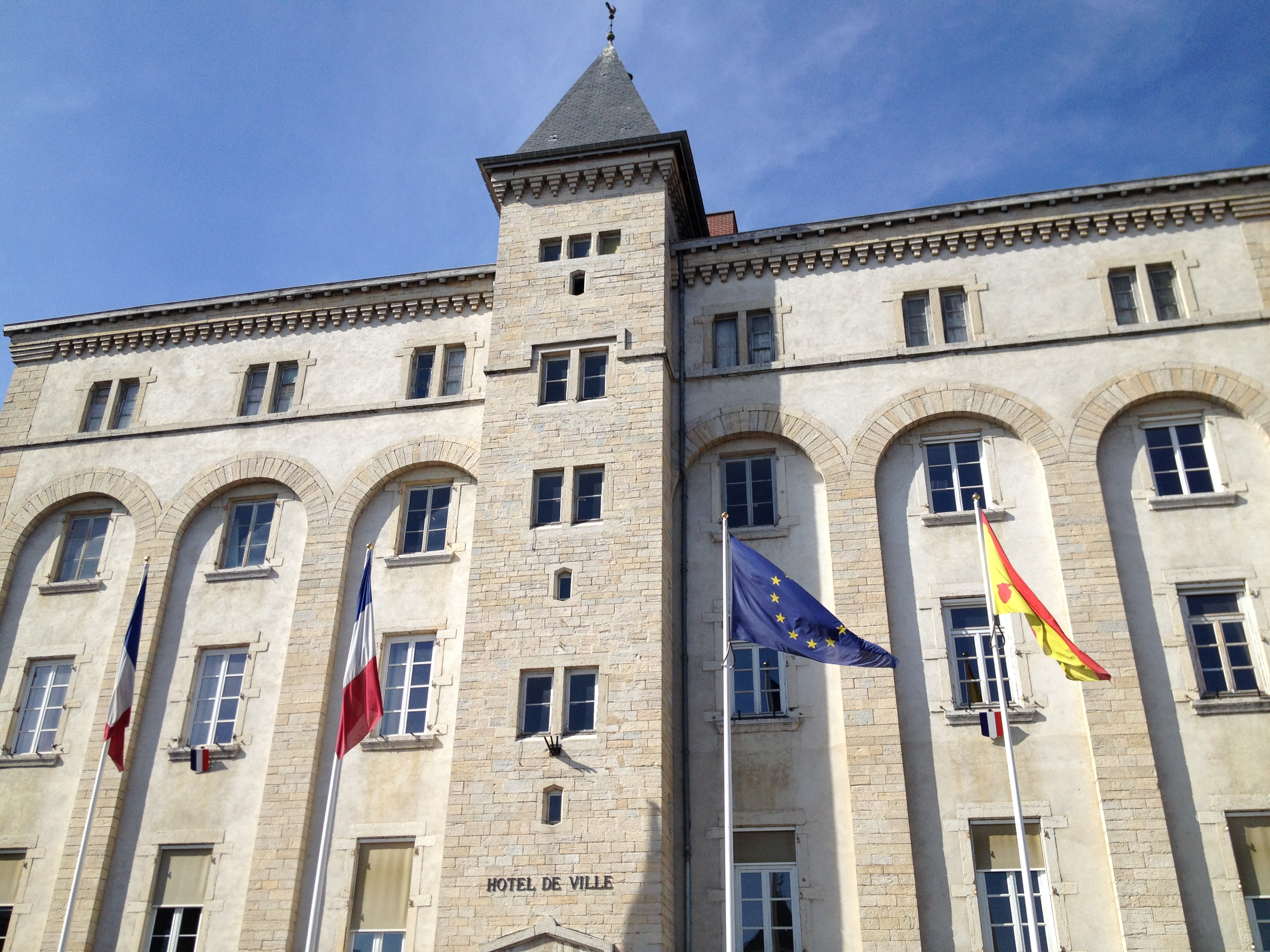 Mairie de Meximieux, occupant les bâtiments de l'ancien petit séminaire.